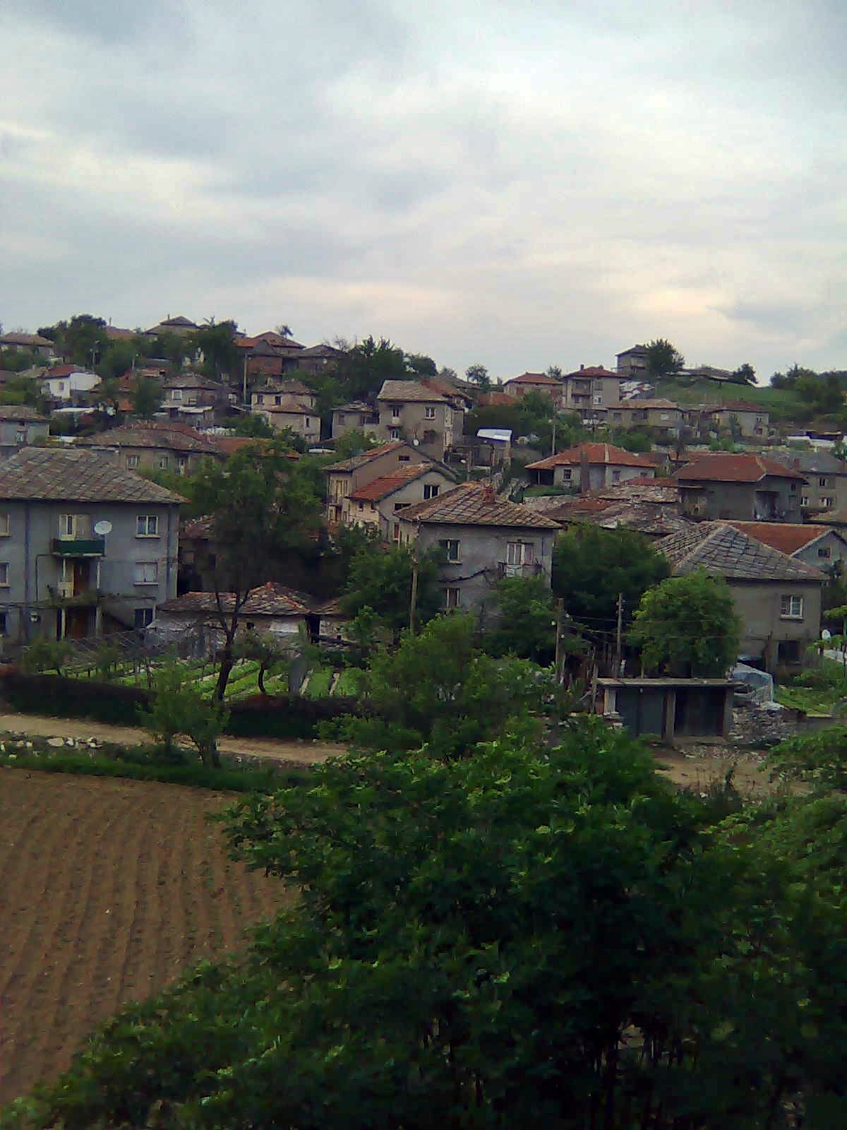 Egrek